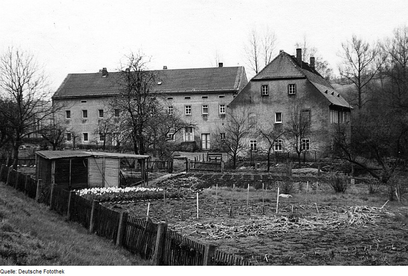 Original image description from the Deutsche FotothekTriebischtal-Robschütz. Eulitzmühle, Außenansicht